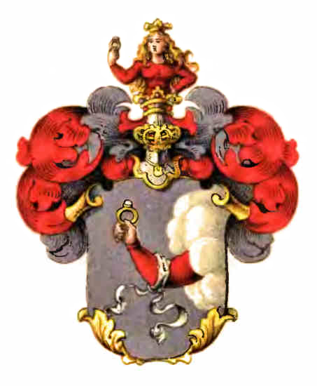 Wappen derer von Lehwald (Variante des Stammwappens)